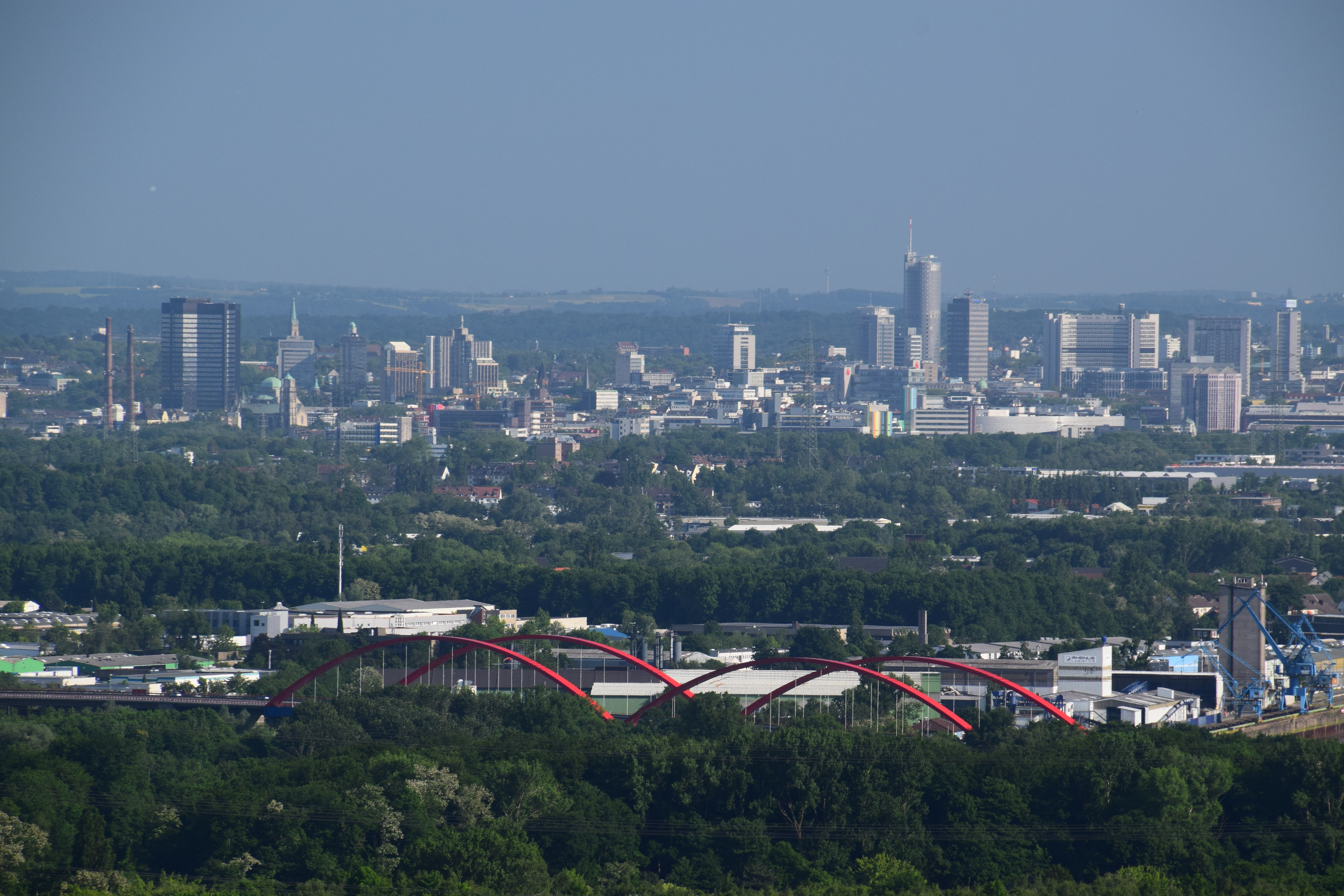 Essen